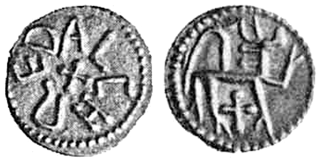 Münze des Königs Alchred von Northumbria (765–774)